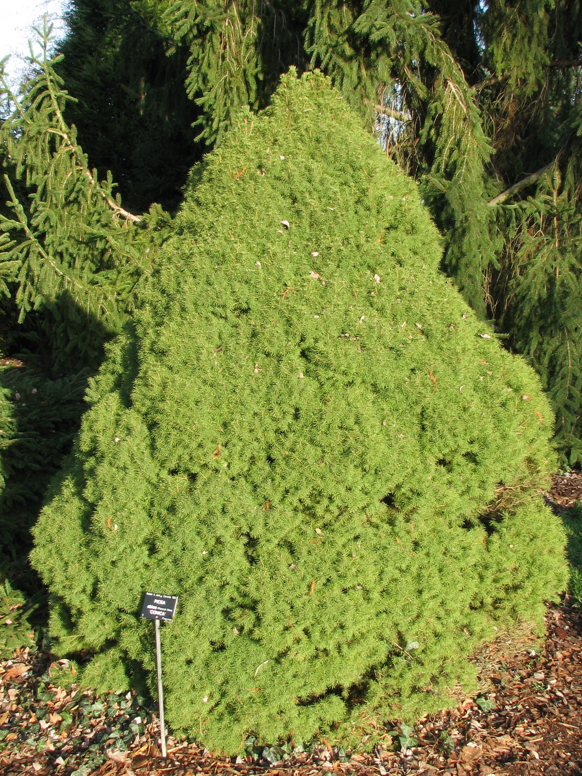 Picea glauca var. albertiana 'Conica'